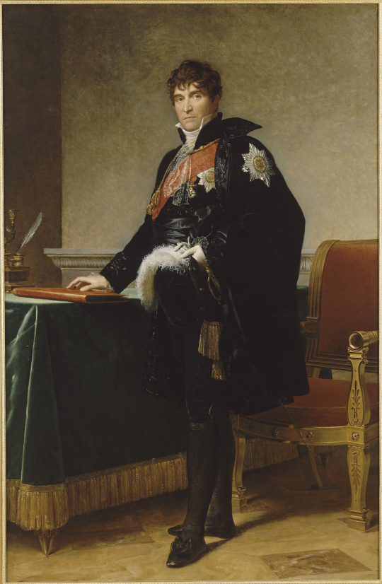 Michel, comte Regnaud de Saint-Jean d'Angély (1761-1819), secrétaire d'Etat de la famille impériale